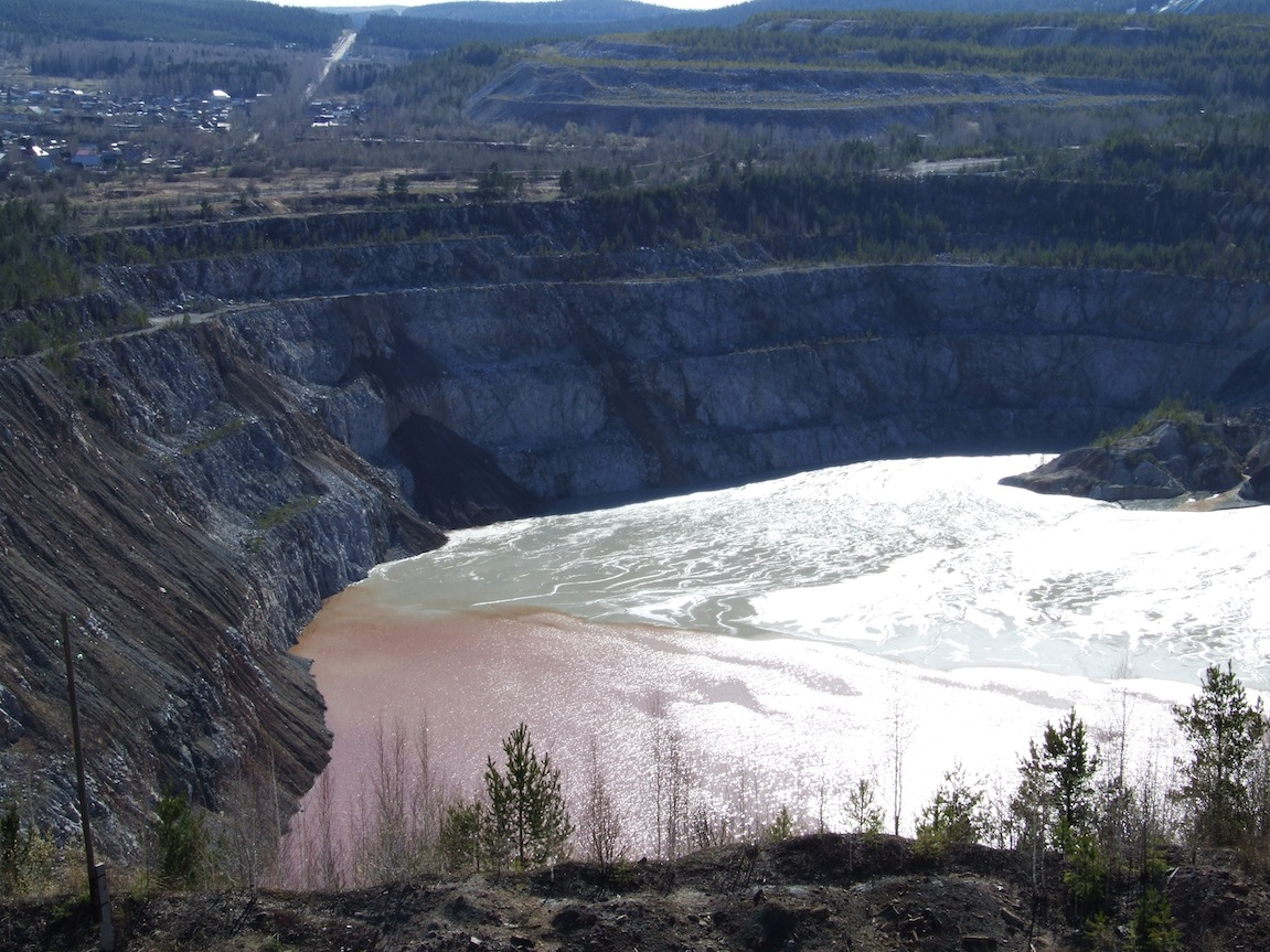 Nizhny Tagil, Sverdlovsk Oblast, Russia